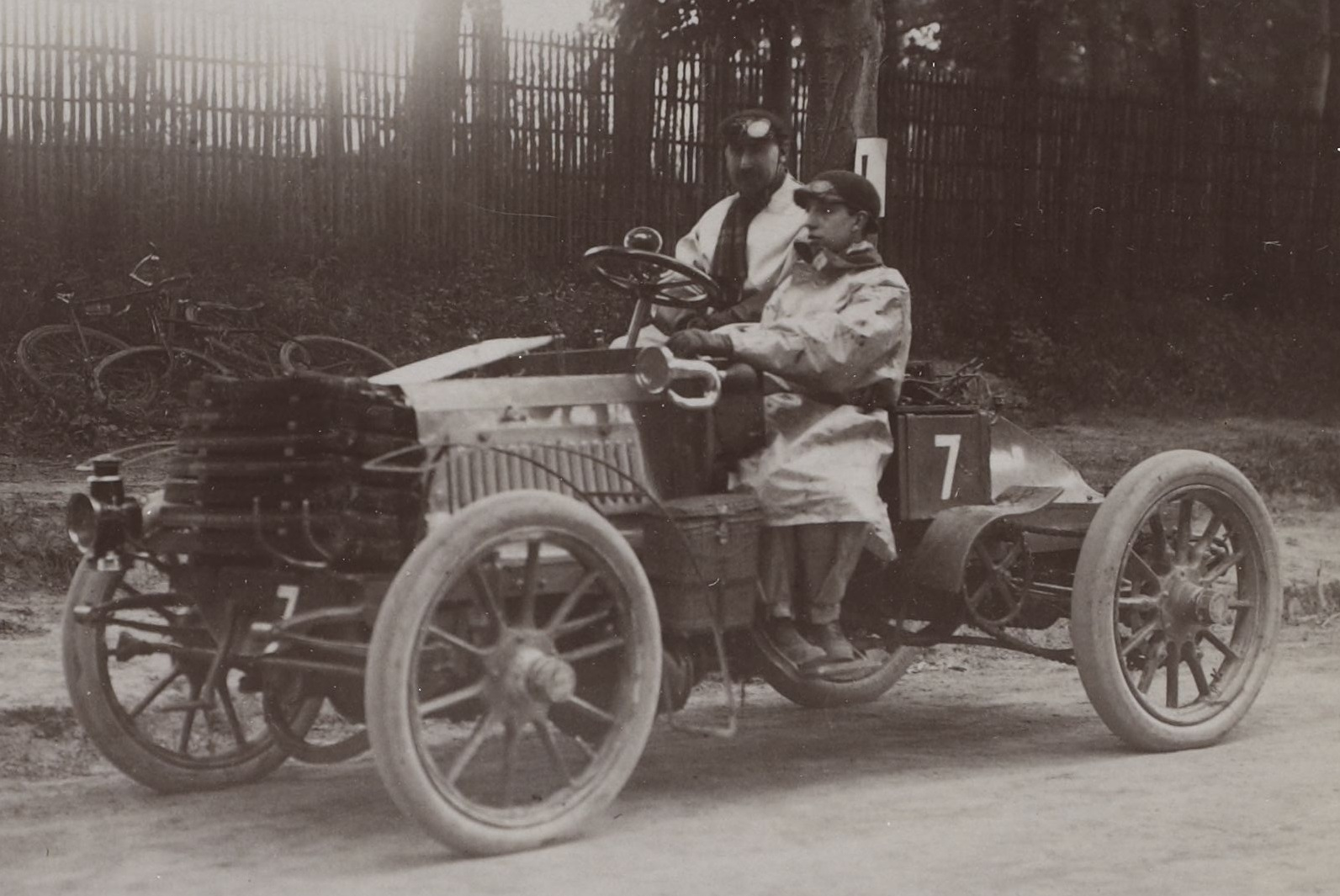 [Collection Jules Beau. Photographie sportive] : T. 15. Année 1901 / Jules Beau : F. 39. [Coupe Gordon-Bennet et Paris - Bordeaux, 29 mai 1901]